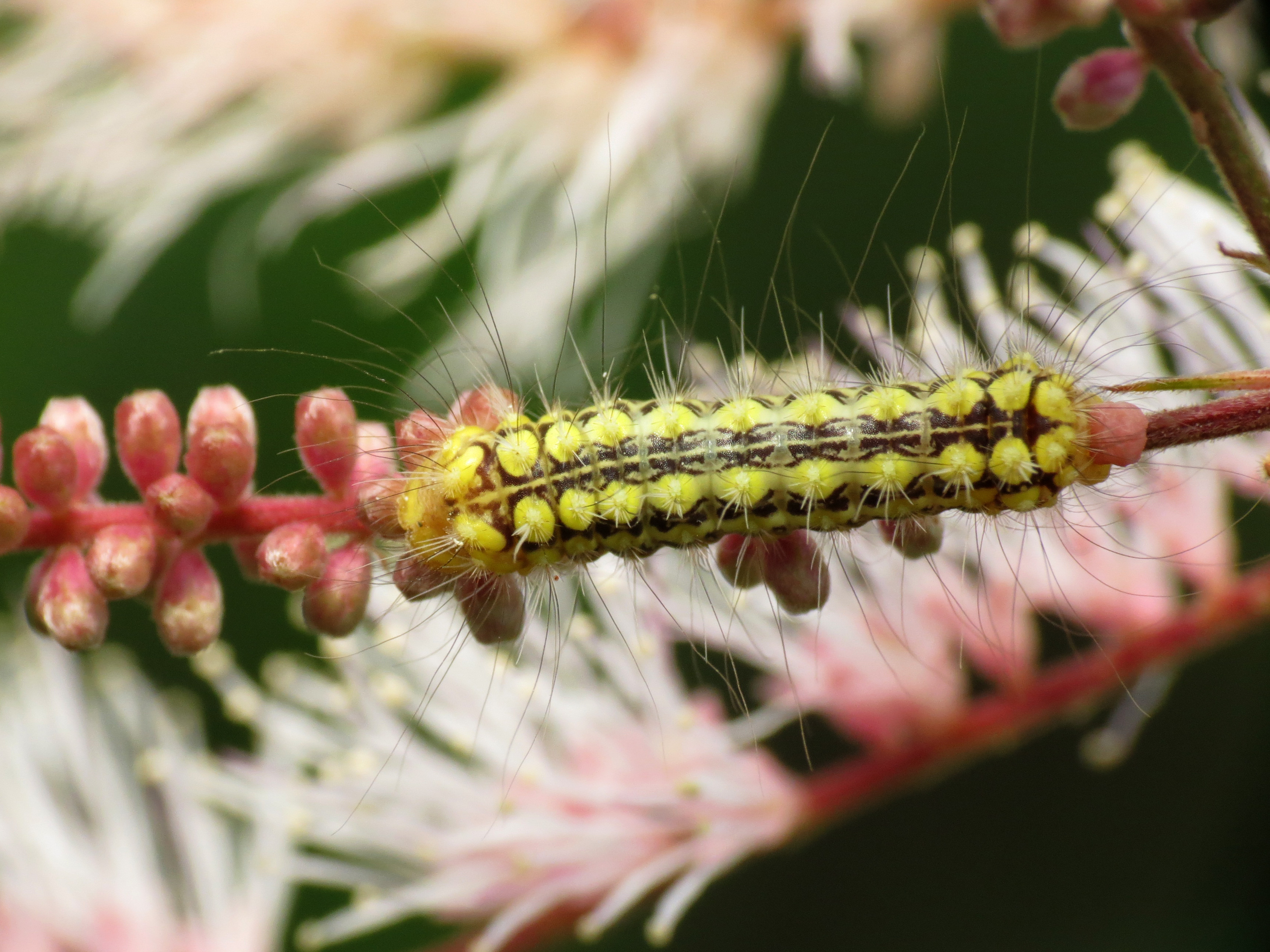 Norape tenera. Peña Blanca, Santa Cruz County, Arizona, USA.